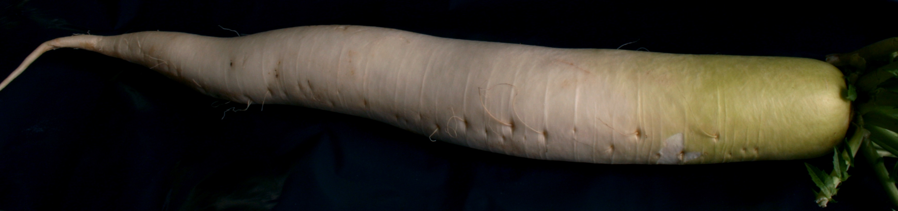 Garten-Rettich, weiß, Italien